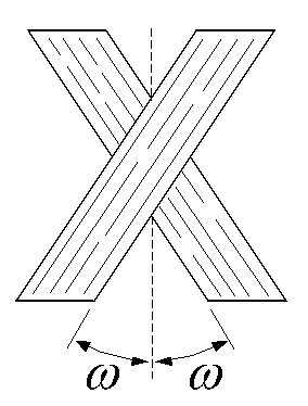 Skizze eines ausgeglichenen Winkelverbundes, AWV